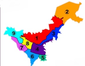 Comunas de Popayán